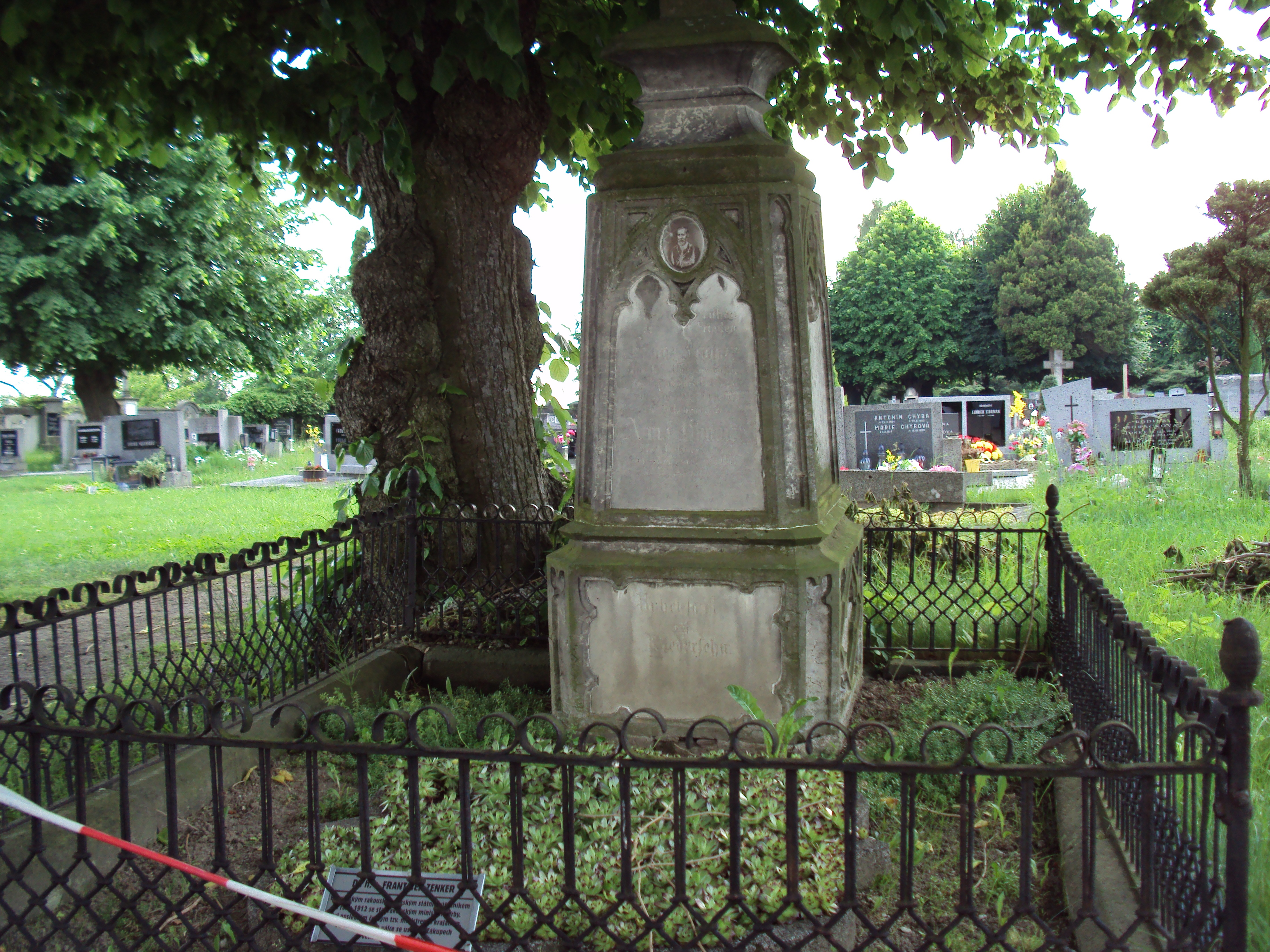 Hrob František Zenkera (+ 1883)